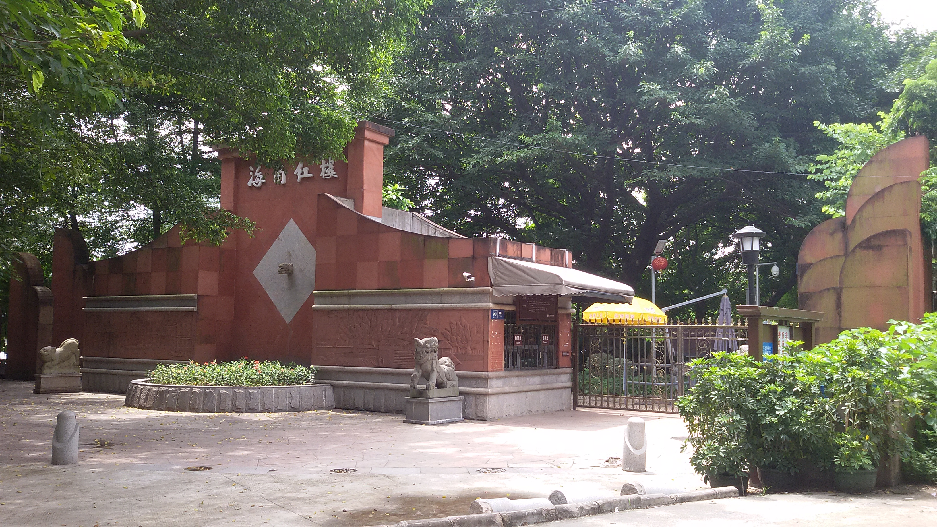 粵語: 海角紅樓嘅北門